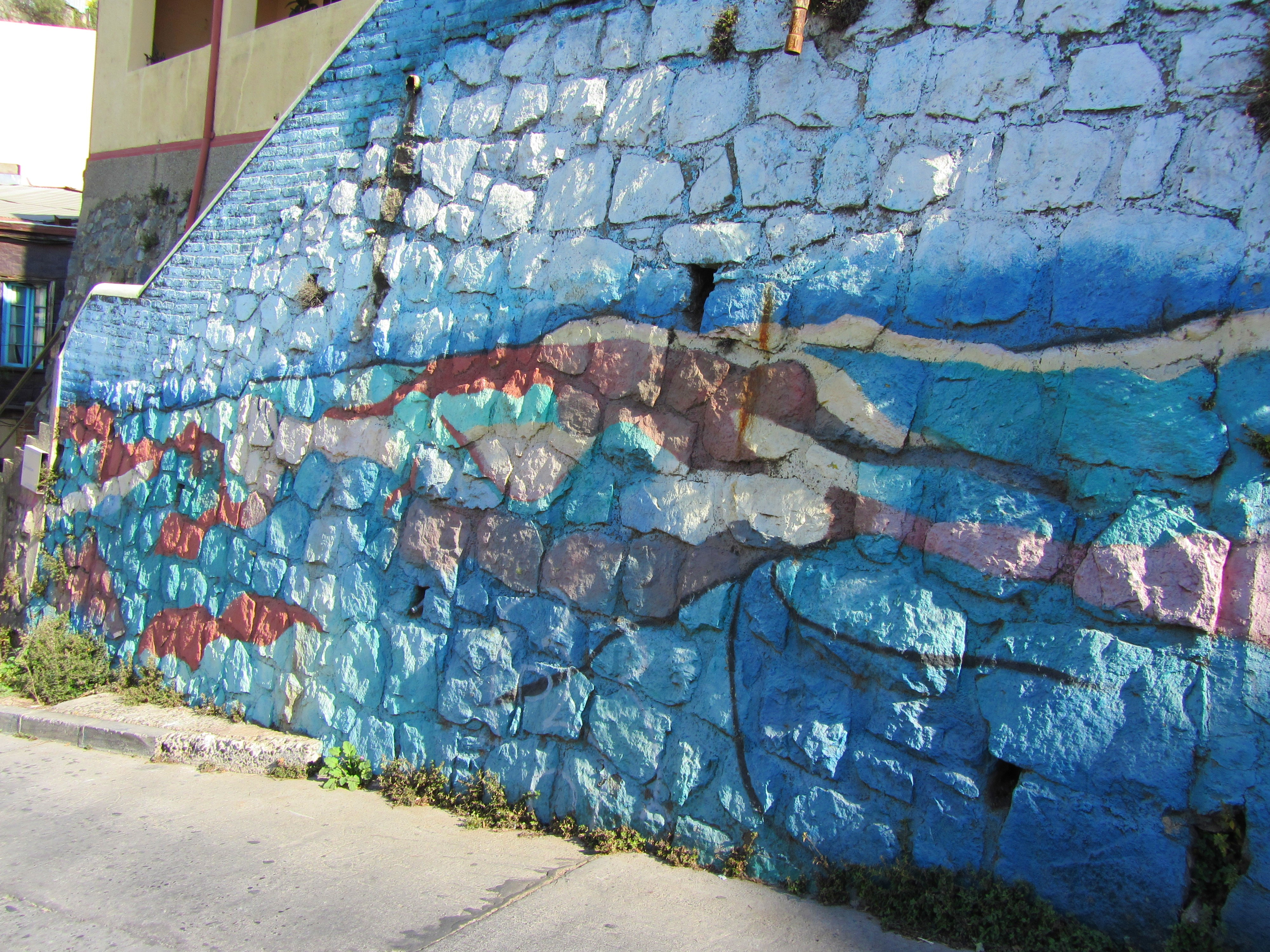 Mural nº15 del Museo a Cielo Abierto de Valparaíso, titulado Rocas amarillas, rojas, verdes con agua y nubes, de Sergio Montecino